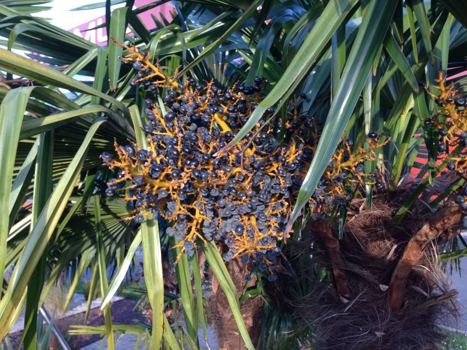 Graines matures de Trachycarpus fortuneï